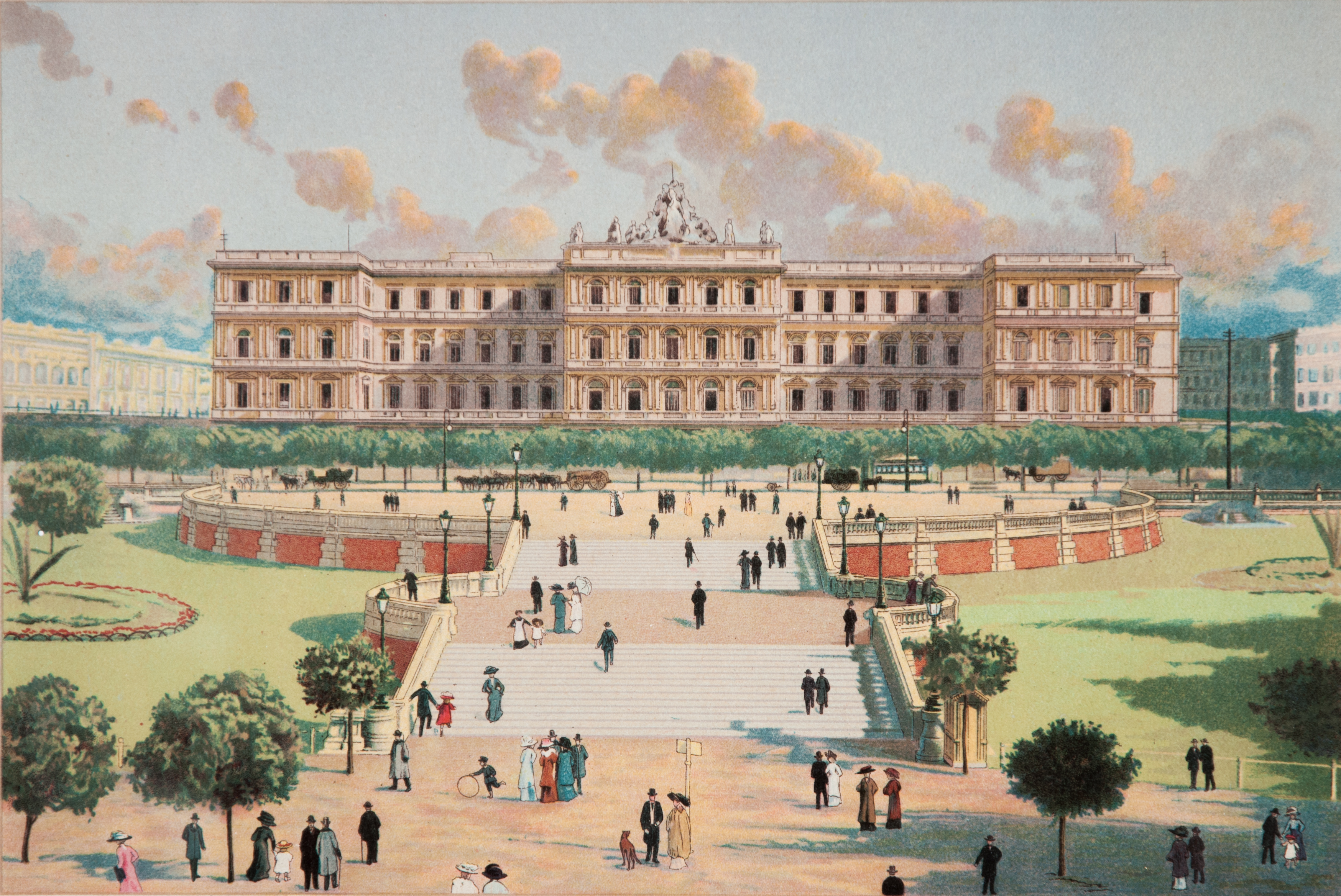 Vistas del frente este (hacia la hoy Plaza Colón).